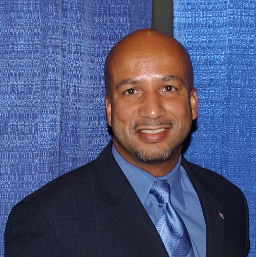 New Orleans mayor C. Ray Nagin